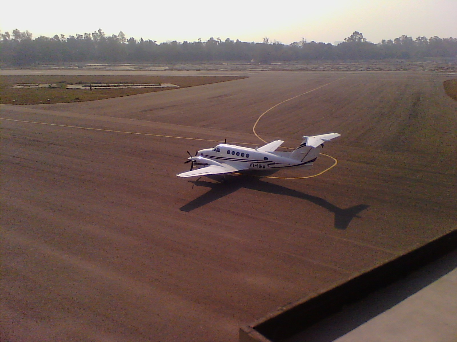 सफ़दरजंग विमानक्षेत्र पर एक विमान